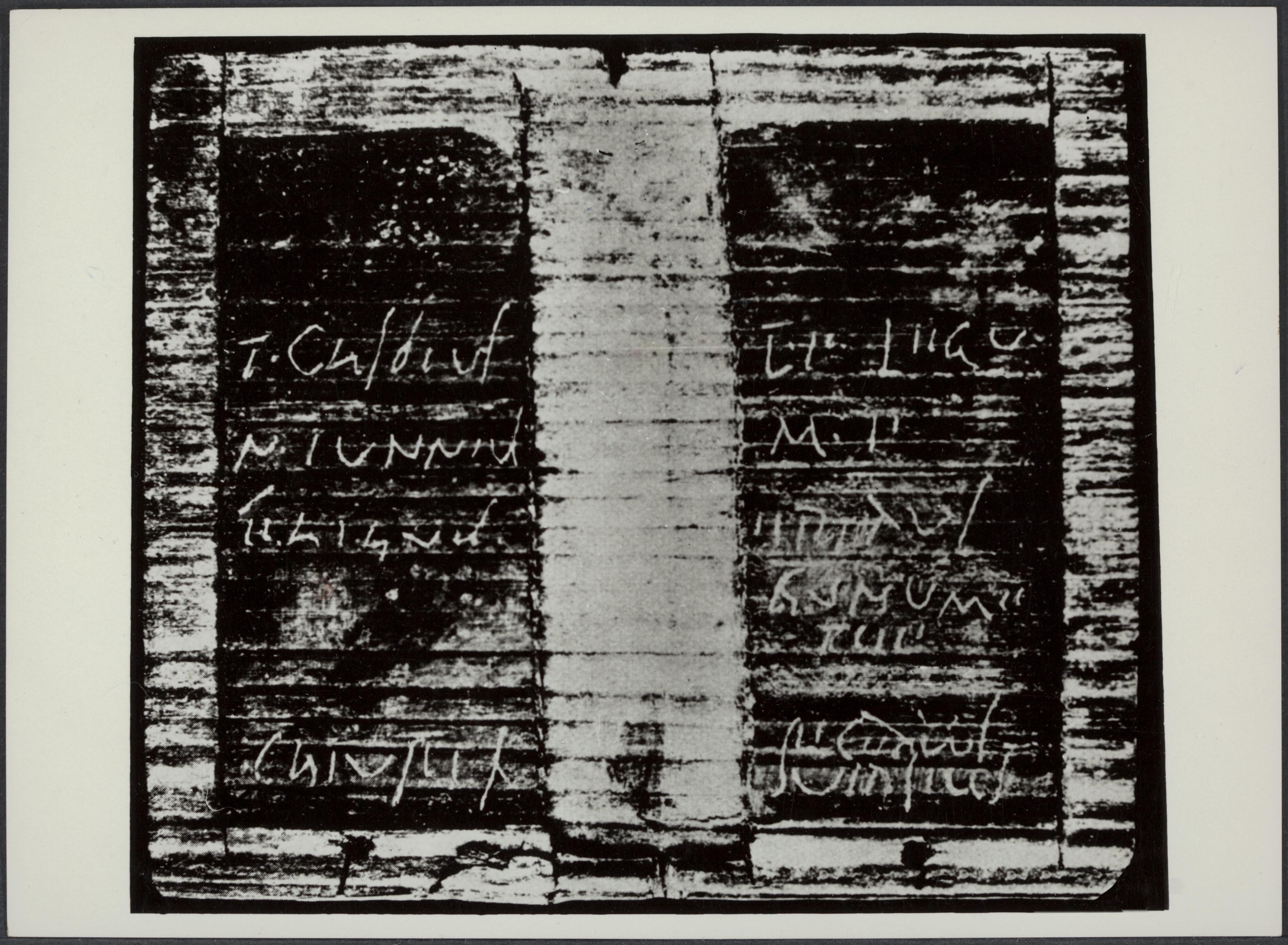 Romeins schrijfplankje met koopcontract van een koe gevonden in Tolsum. Eind 2007 hebben Fries Museum en Tresoar - Fries Historisch en Letterkundig Centrum de tekst op het schrijfplankje opnieuw laten onderzoeken aan de Universiteit van Oxford (prof. dr. A. Bowman en dr. R. Tomlin) en Universiteit Leiden (prof. dr. K.A. Worp). April van dit jaar hebben we de onderzoeksresultaten gepresenteerd via een perspresentatie en een internationaal wetenschappelijk symposium, en daarop volgend met een reizende tentoonstelling door Nederland. Het onderzoek wordt in november 2009 gepubliceerd in het gezaghebbende ‘Journal of Roman Studies’. Drs. E. kramer (conservator Fries Museum) en ikzelf (bibliothecaris Tresoar, Buma Bibliotheek) waren namens beide instituten hierbij betrokken. Het nieuwe onderzoek onthult een geheel nieuwe tekst op dit Romeinse schrijfplankje met exacte datering. Het betreft een schuldverklaring tussen een Romeinse slaaf Carus (of: Andecarus) en een onbekende schuldenaar. Het document is op 23 februari 29 n. Chr. opgesteld. Met deze datering herbergt het schrijfplankje uit Tolsum de oudst bewaard gebleven geschreven tekst van Nederland Fotograaf: Han de Vries, Fries Museum